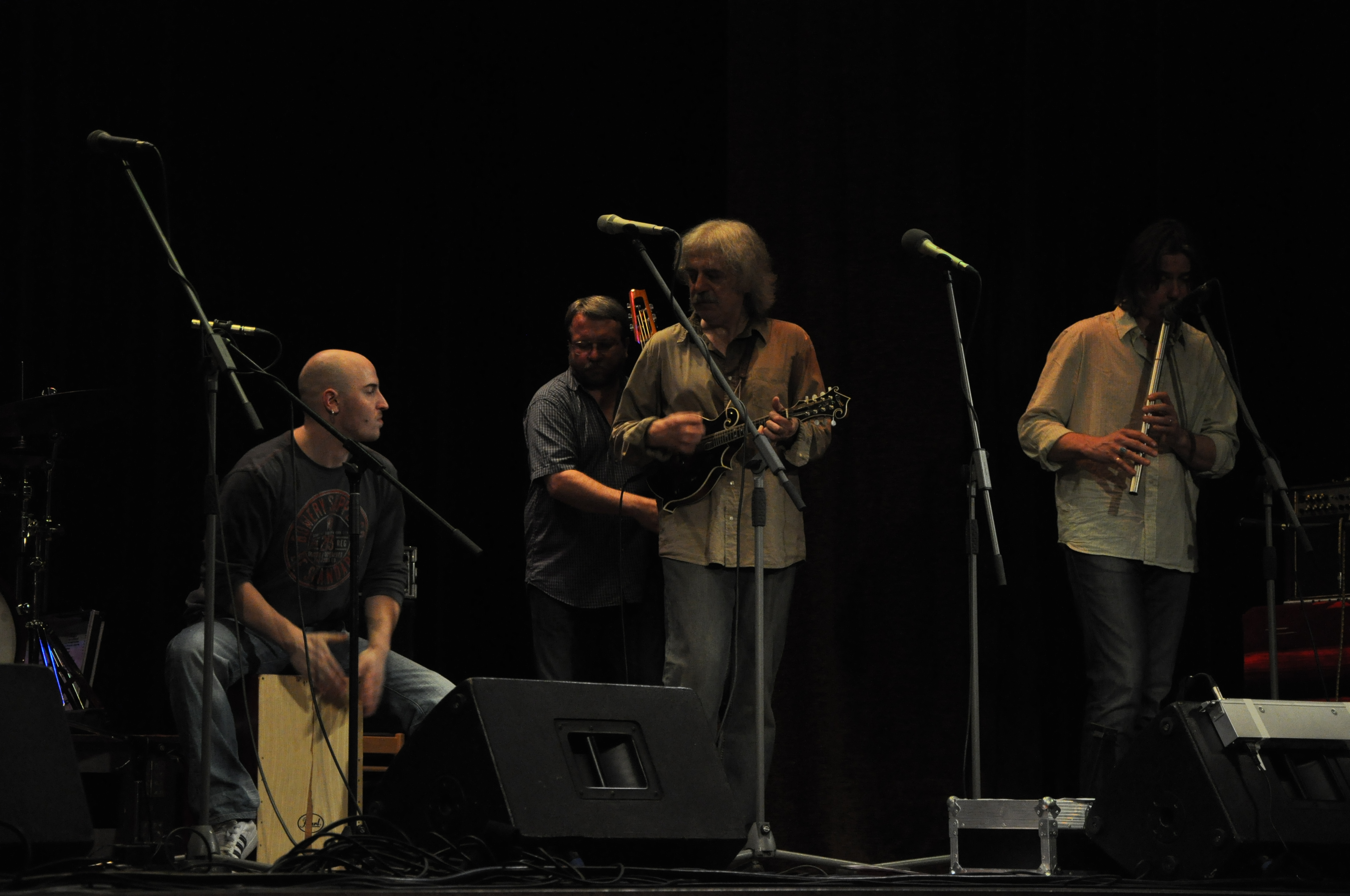 Druhá tráva na dvojkoncertě Garcia a Druhá tráva v Hradci Králové 18. dubna 2009.